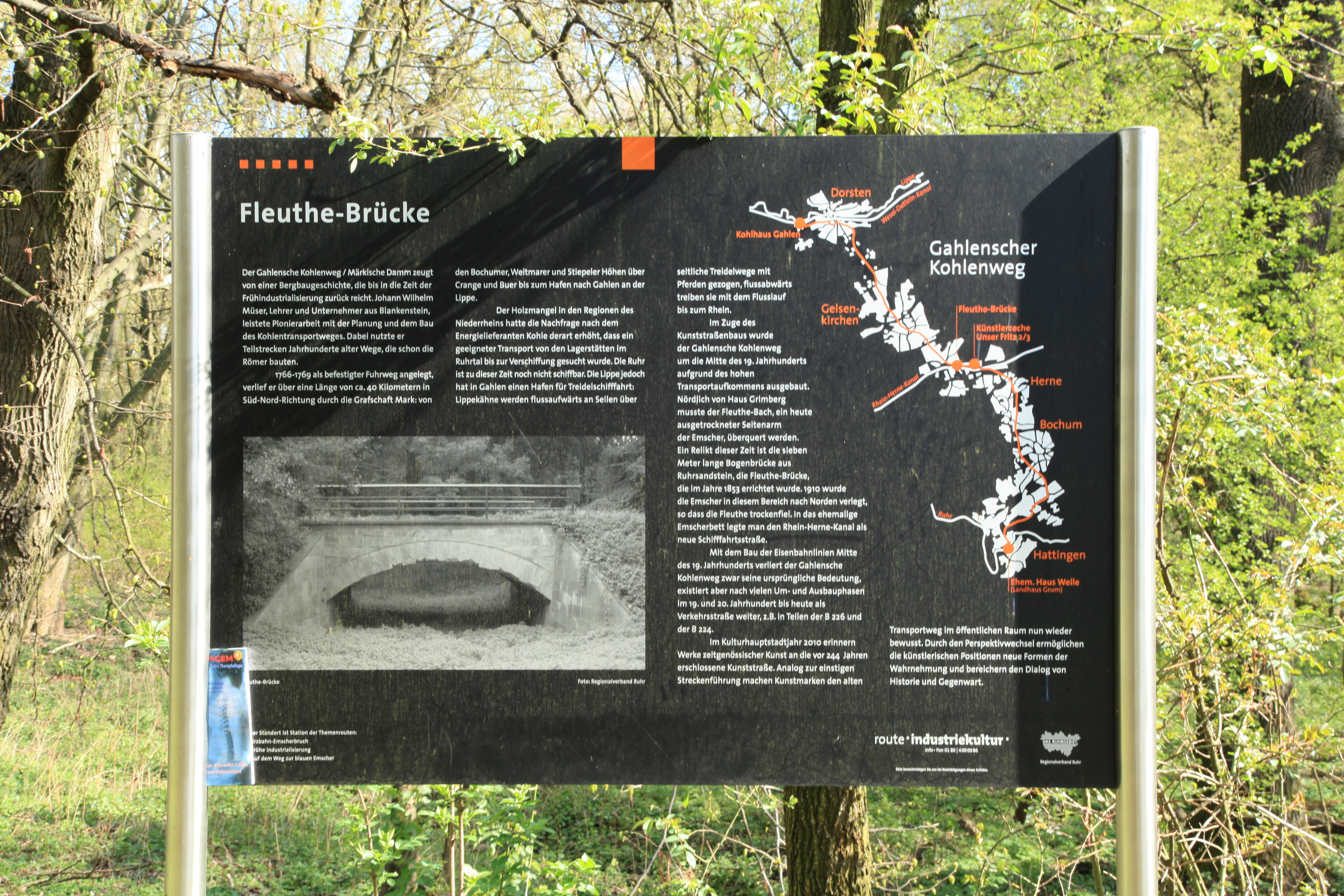 Fleuthebrücke an der Willy-Brandt-Allee, Grenze von Gelsenkirchen und Herne